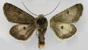 Lasionycta quadrilunata yukona male